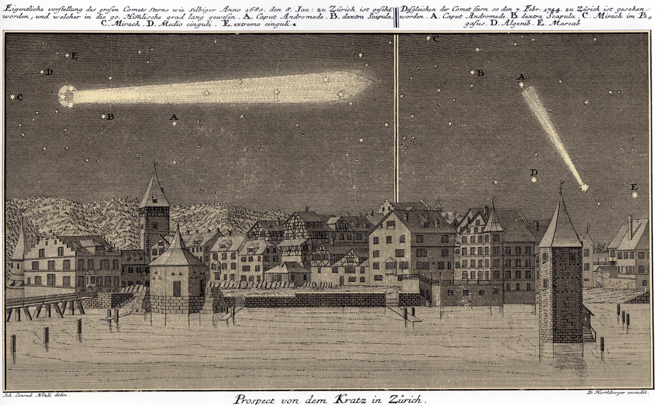 Ansicht des oberen Kratzquartiers in Zürich mit den beiden Kometen von 1680/81 und 1744. Radierung von David Herrliberger nach zwei Tuschezeichnungen von Hand Conrad Nözli. Publiziert unter dem Titel «Prospect von dem Kratz in Zürich / mit dem grossen Cometen A. 1680. Deßgleichen dessen von A. 1744. wie selbige allhier gesehen worden sind / a 4 Schilling.»